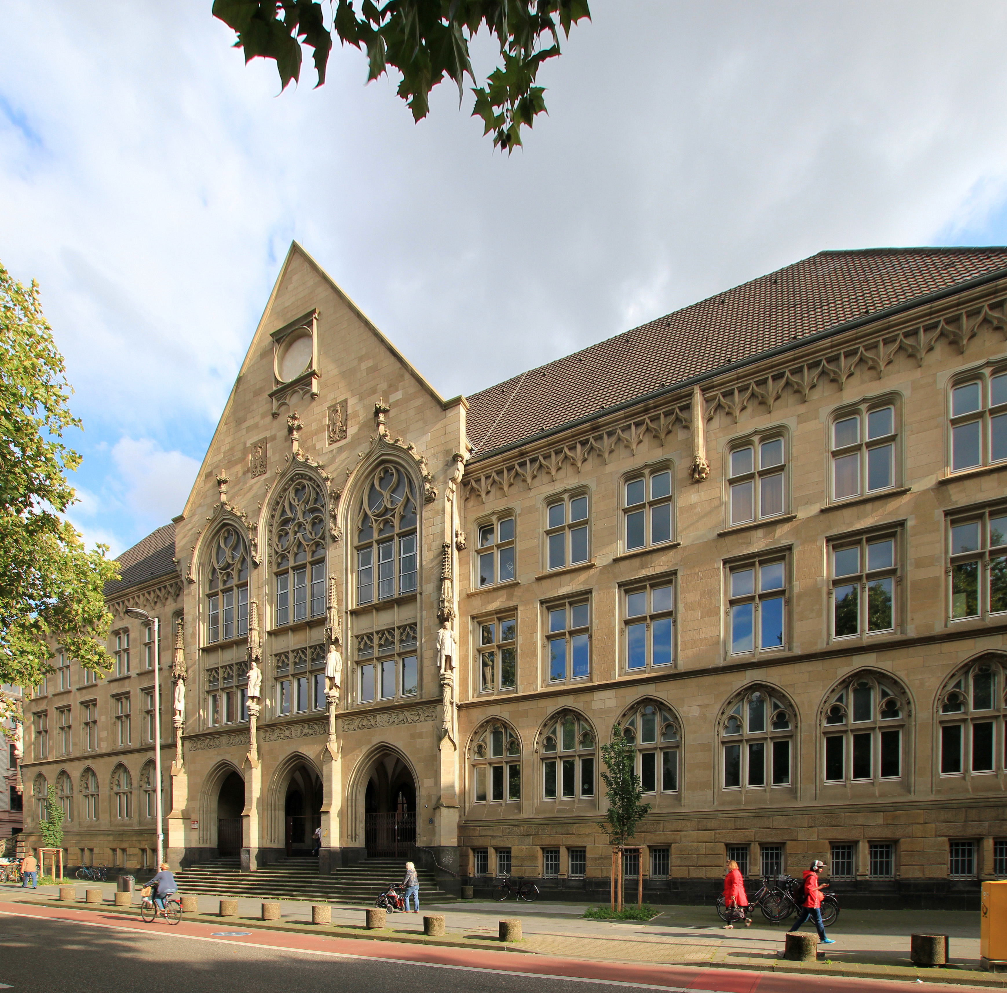 Köln-Neustadt-Nord, Hansagymnasium Hansaring 54-58 This is a photograph of an architectural monument.